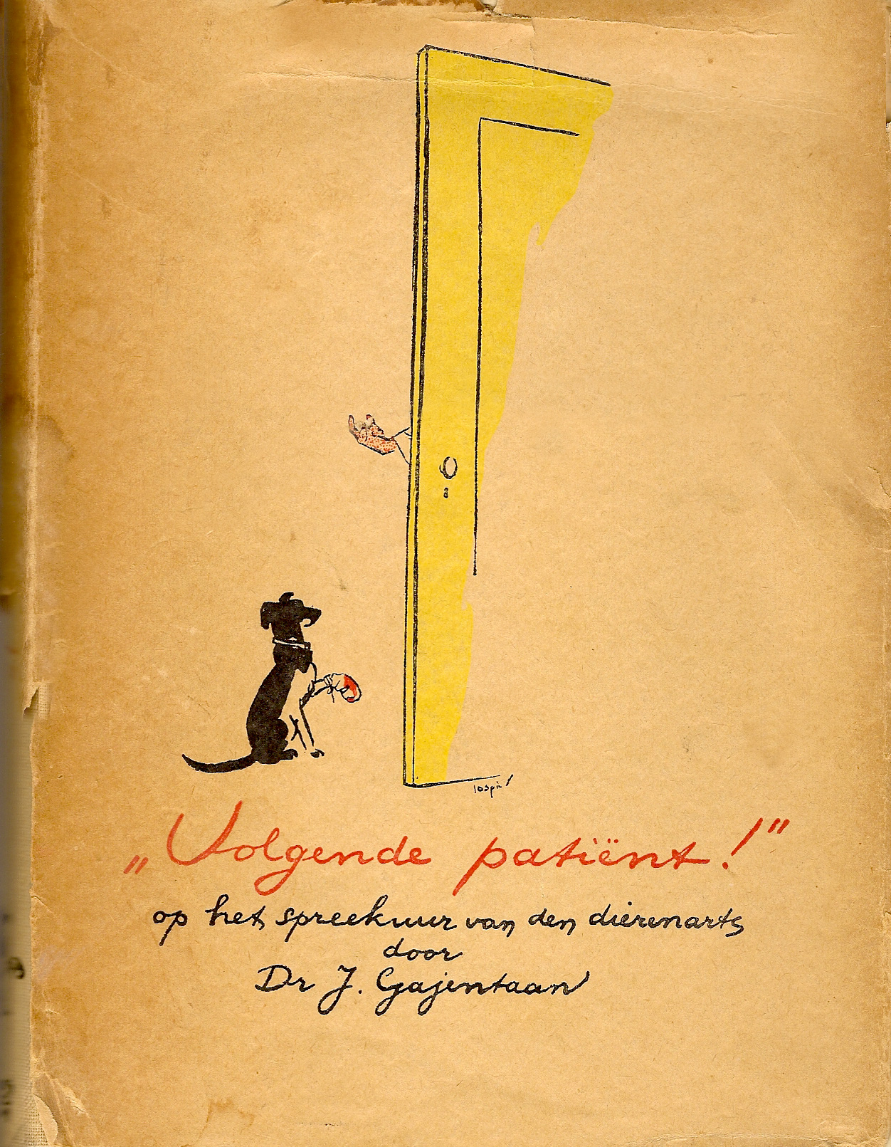 "Volgende patiënt!" op het spreekuur van den dierenarts door Dr. J. Gajentaan